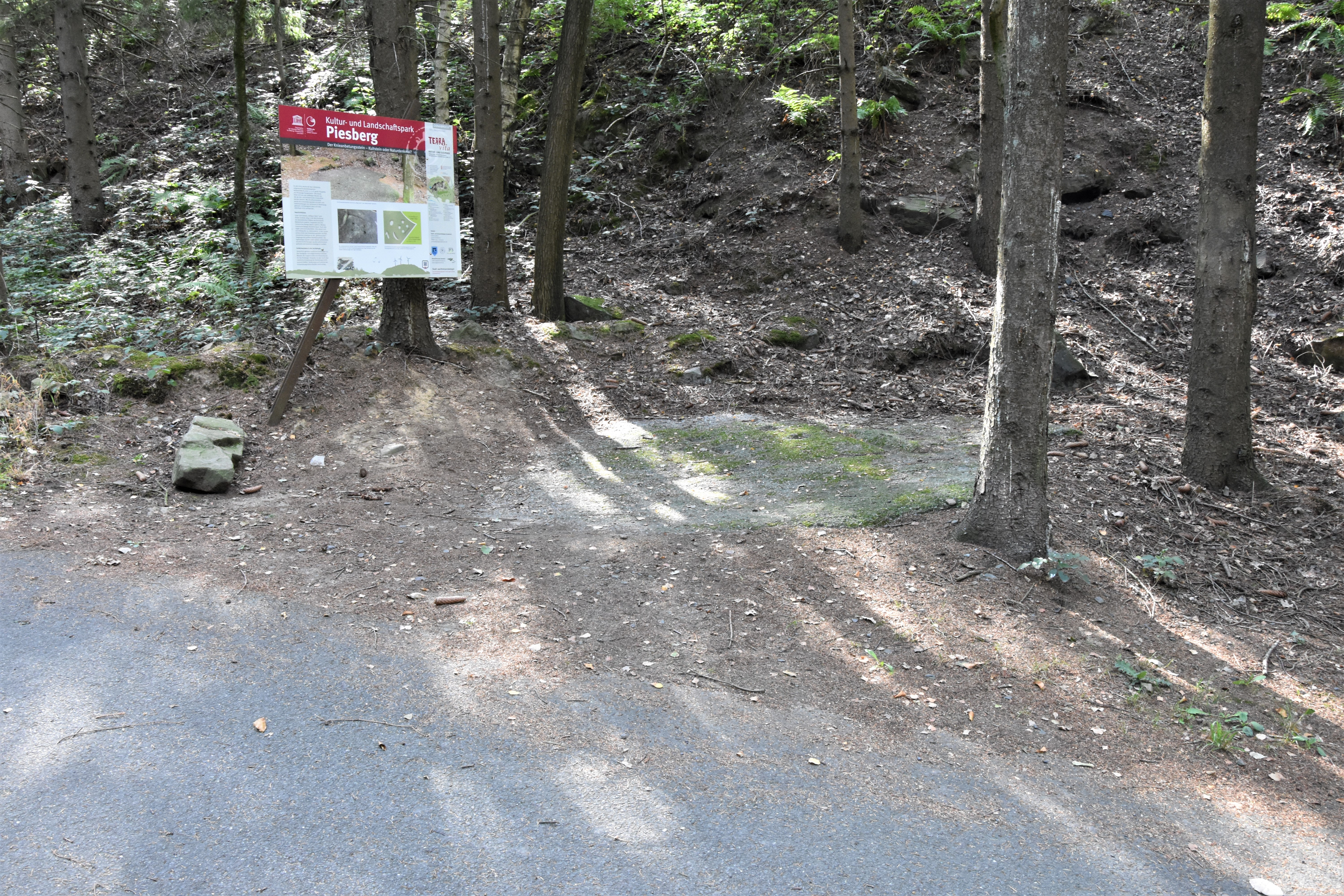 Knieanbetungsstein